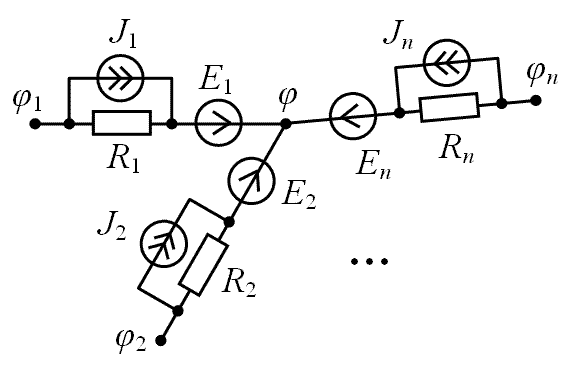 Фрагмент электрической цепи: узел с примыкающими к нему звеньями.